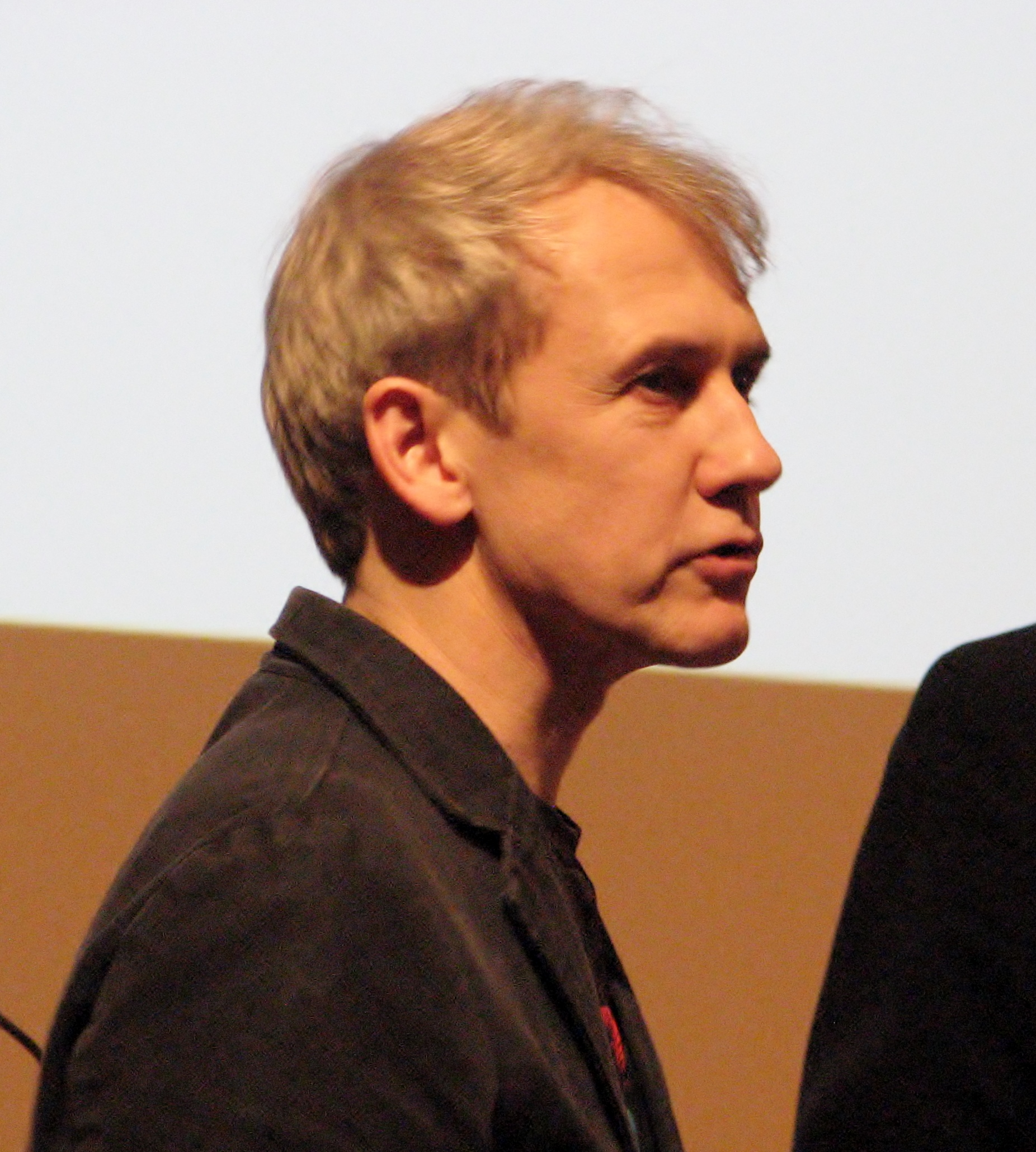 Marko Mäetamm konkursi 25 kauneimat Eesti raamatut ja 5 kauneimat lasteraamatut 2013 autasustamisel